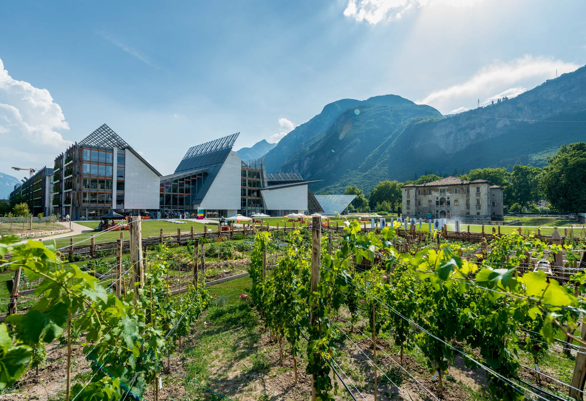 Il MUSE e l'orto sul lato nord.